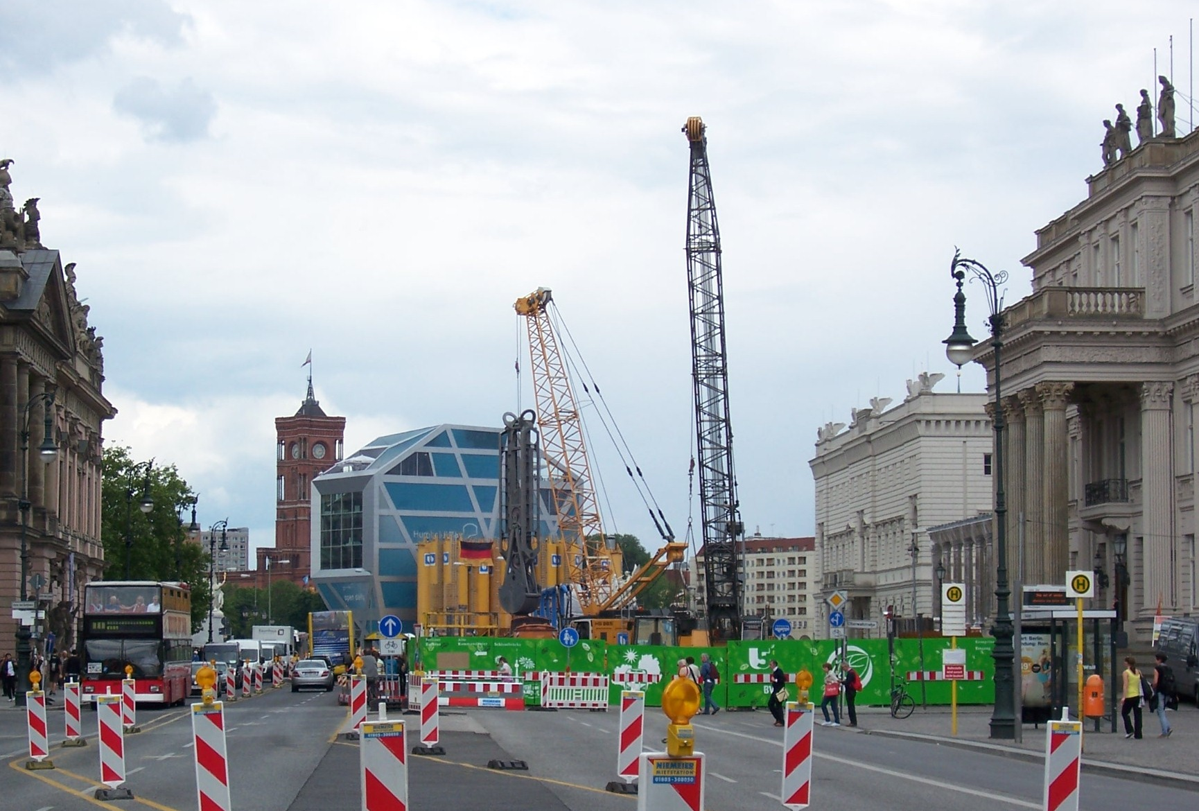 Baustelle des U-Bahnhofs Museumsinsel, Juni 2012